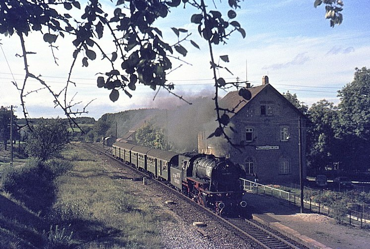 Wallhausen(Württ) am 27.09.1975 N 7543 mit Zuglok 023 058-1